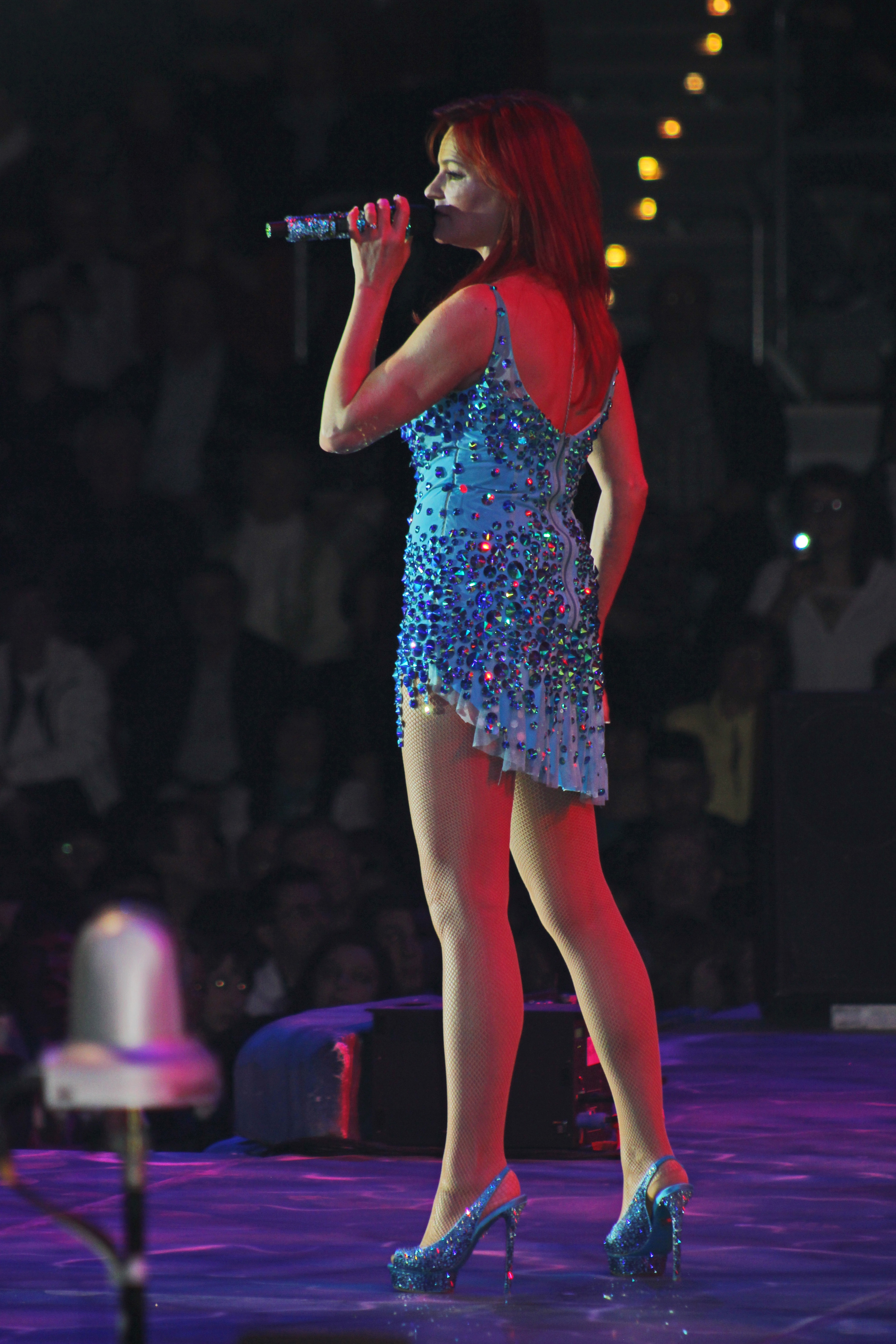 ATLANTIS Andrea Berg in Chemnitz im Februar 2014.